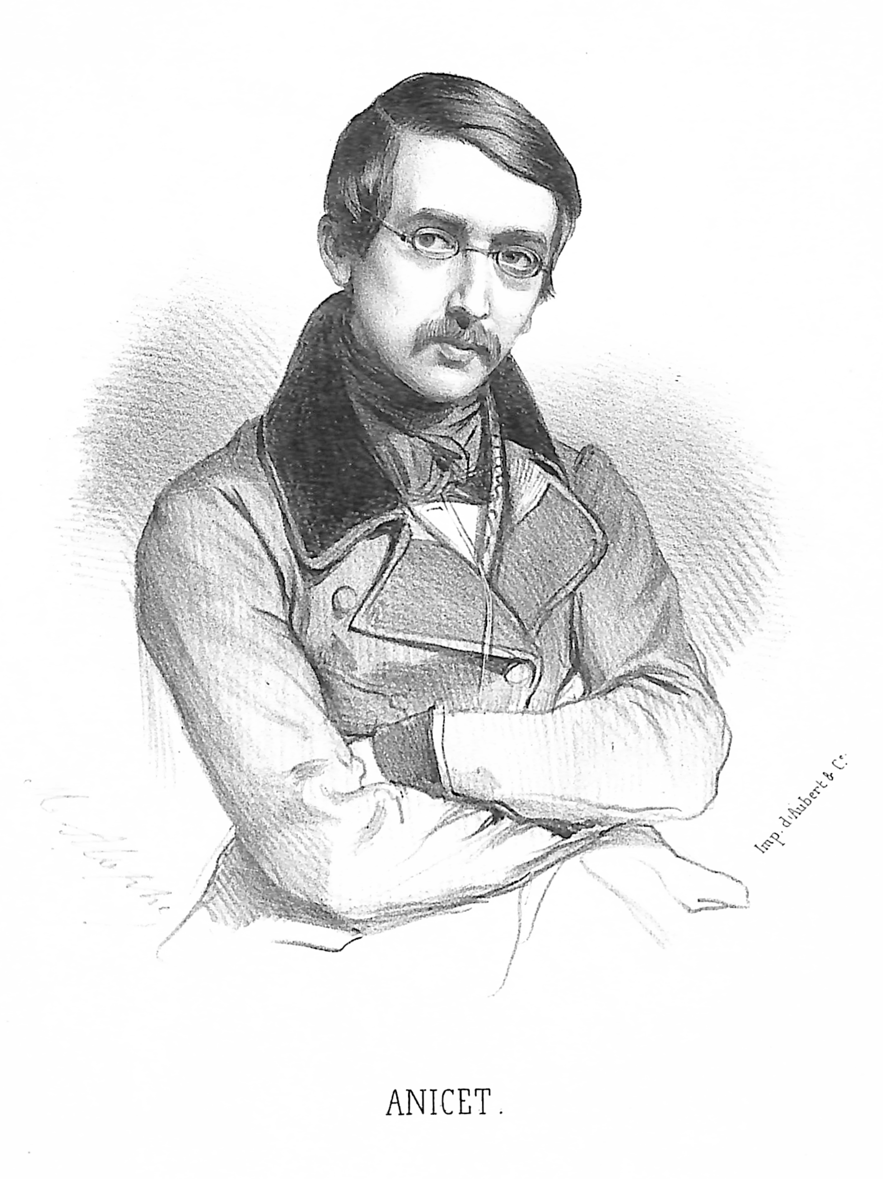 Portrait d'Auguste Anicet-Bourgeois par Marie-Alexandre Alophe